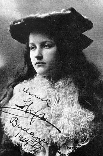 Stefi Geyer (* 28. Juni 1888 in Budapest; † 11. Dezember 1956 in Zürich), ungarische Violinistin.